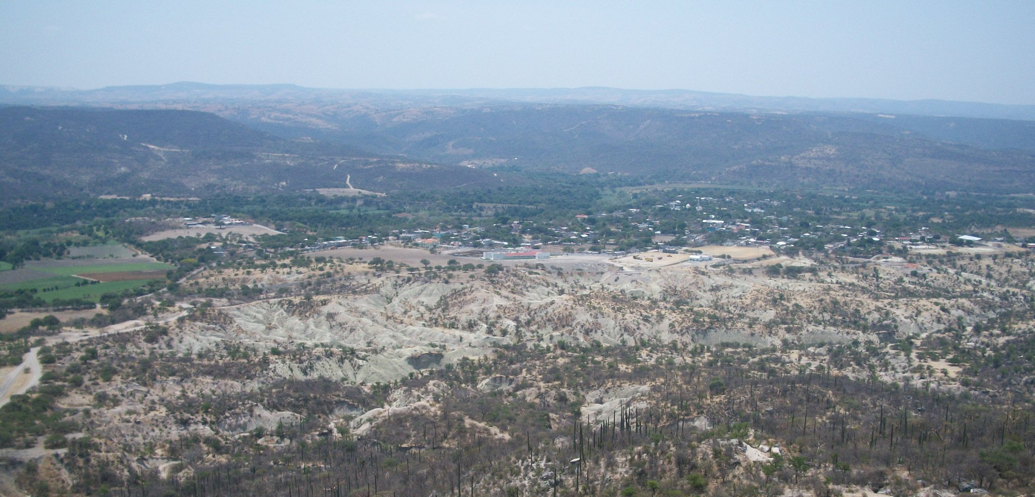 Vista de la población de Zacapala desde la planicie de Santa Catarina Tlaltempan.